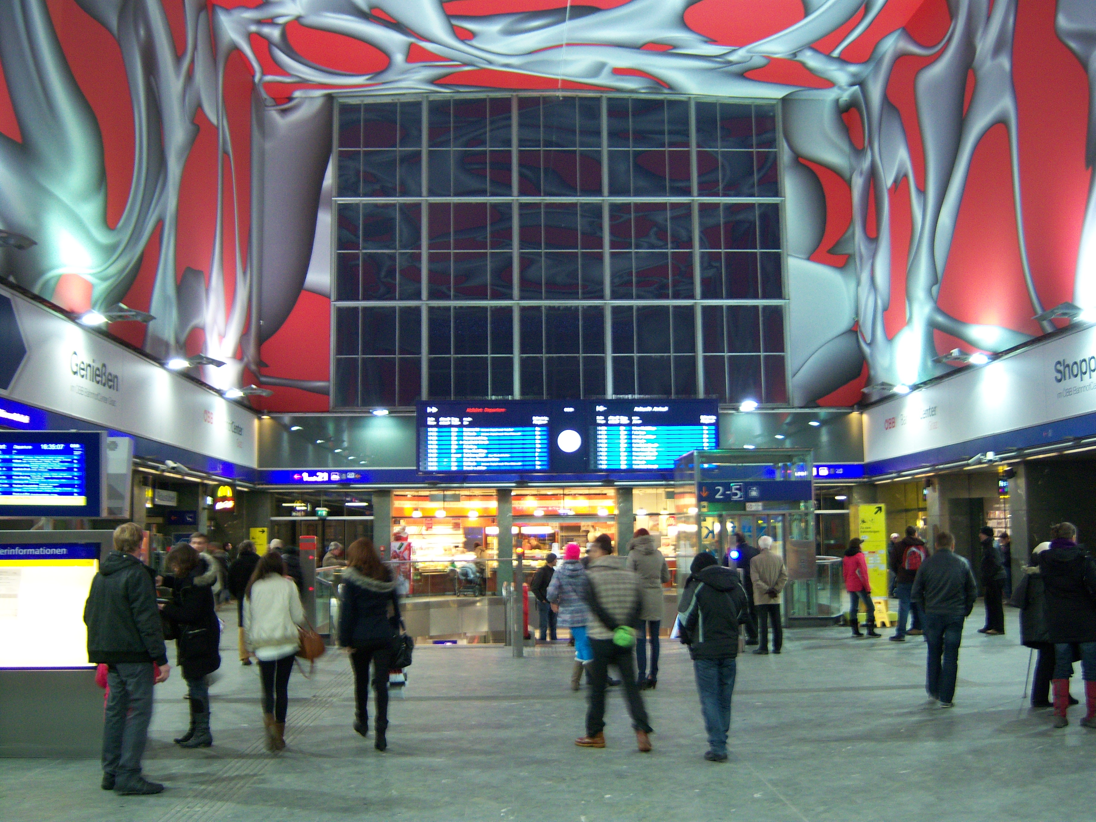 Bahnhofshalle des Grazer Hauptbahnhofes